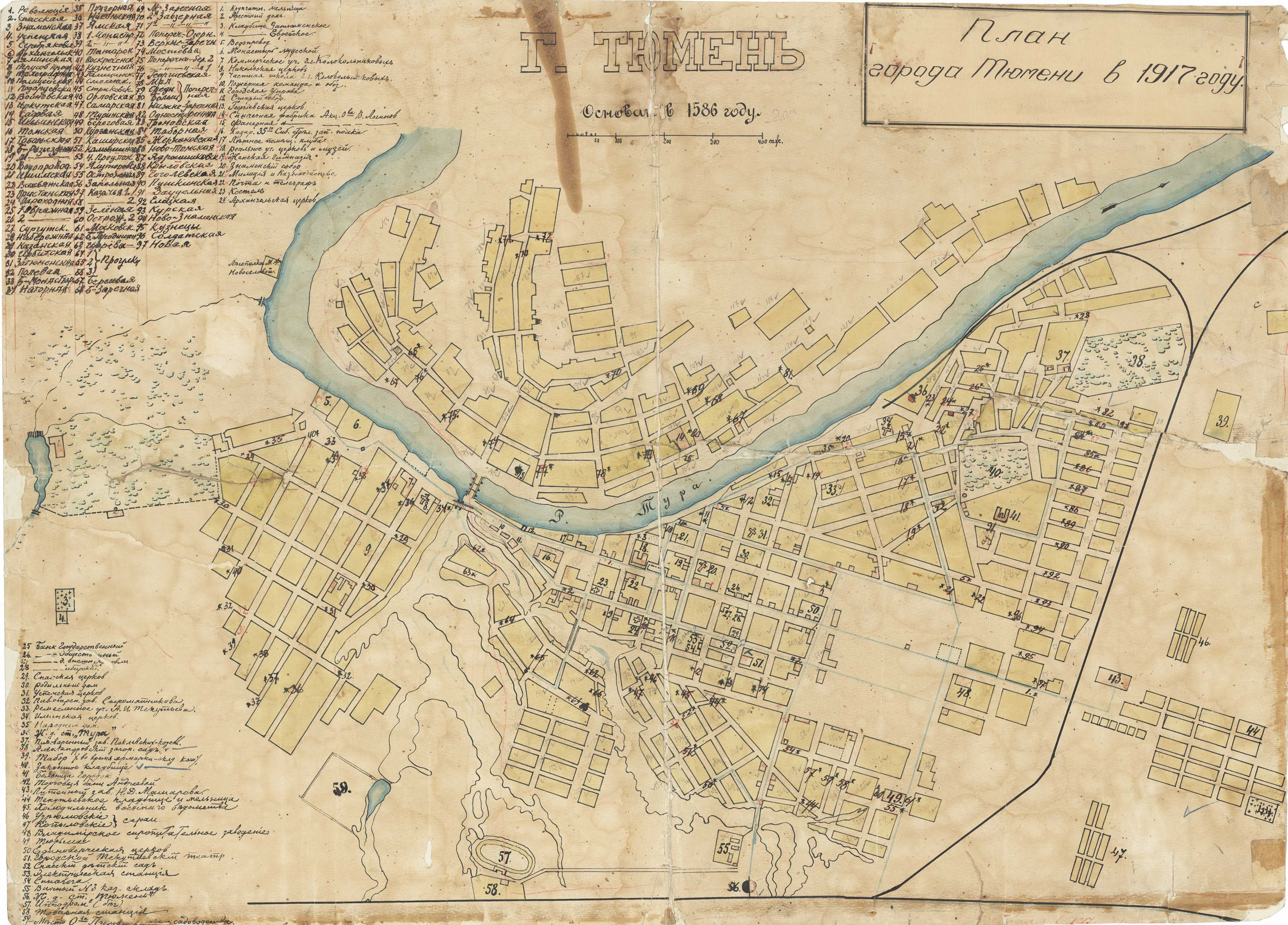 Подробная карта города с указанием основных общественных зданий и сооружений.